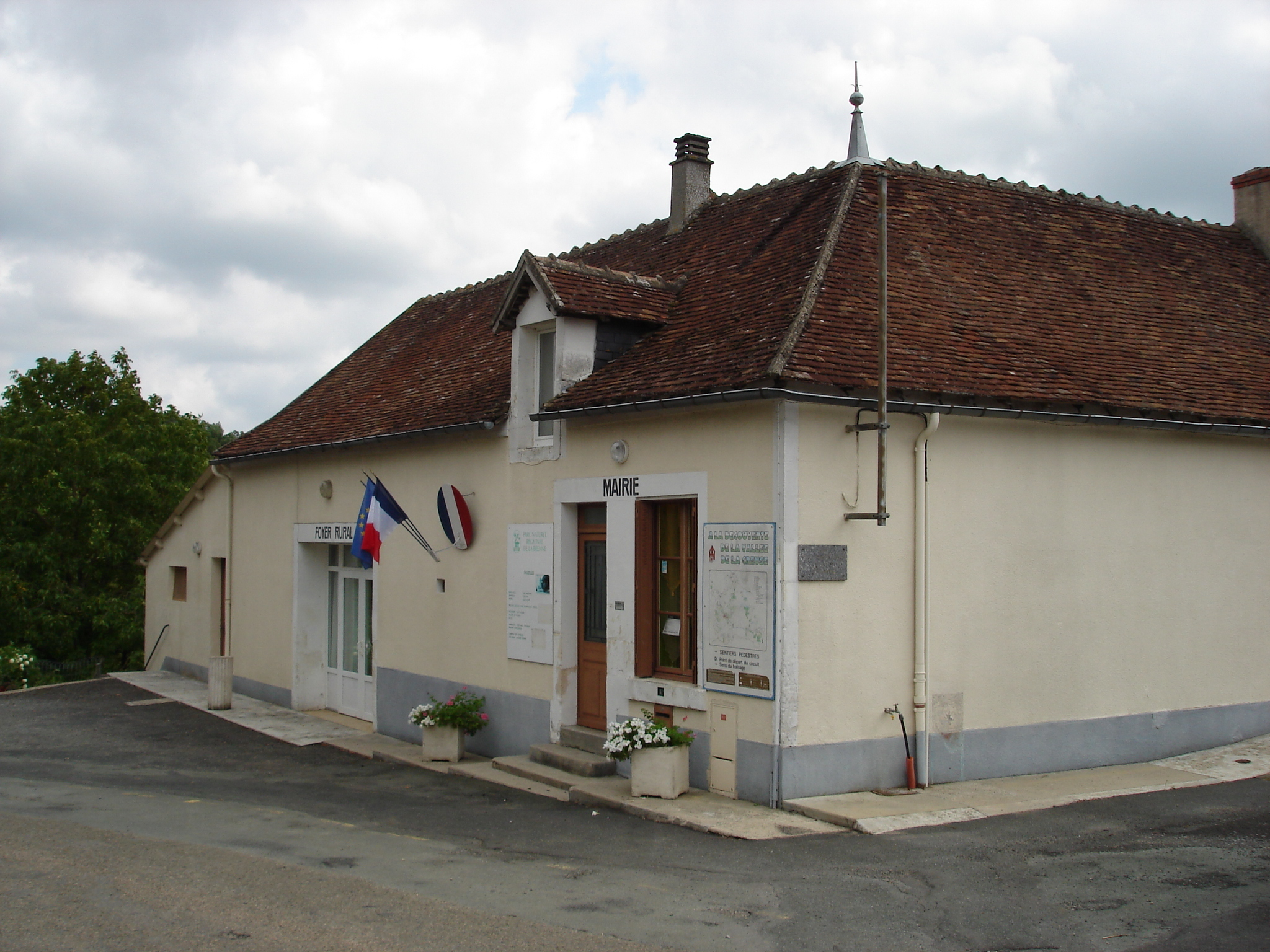 Sauzelles (36) : La mairie.